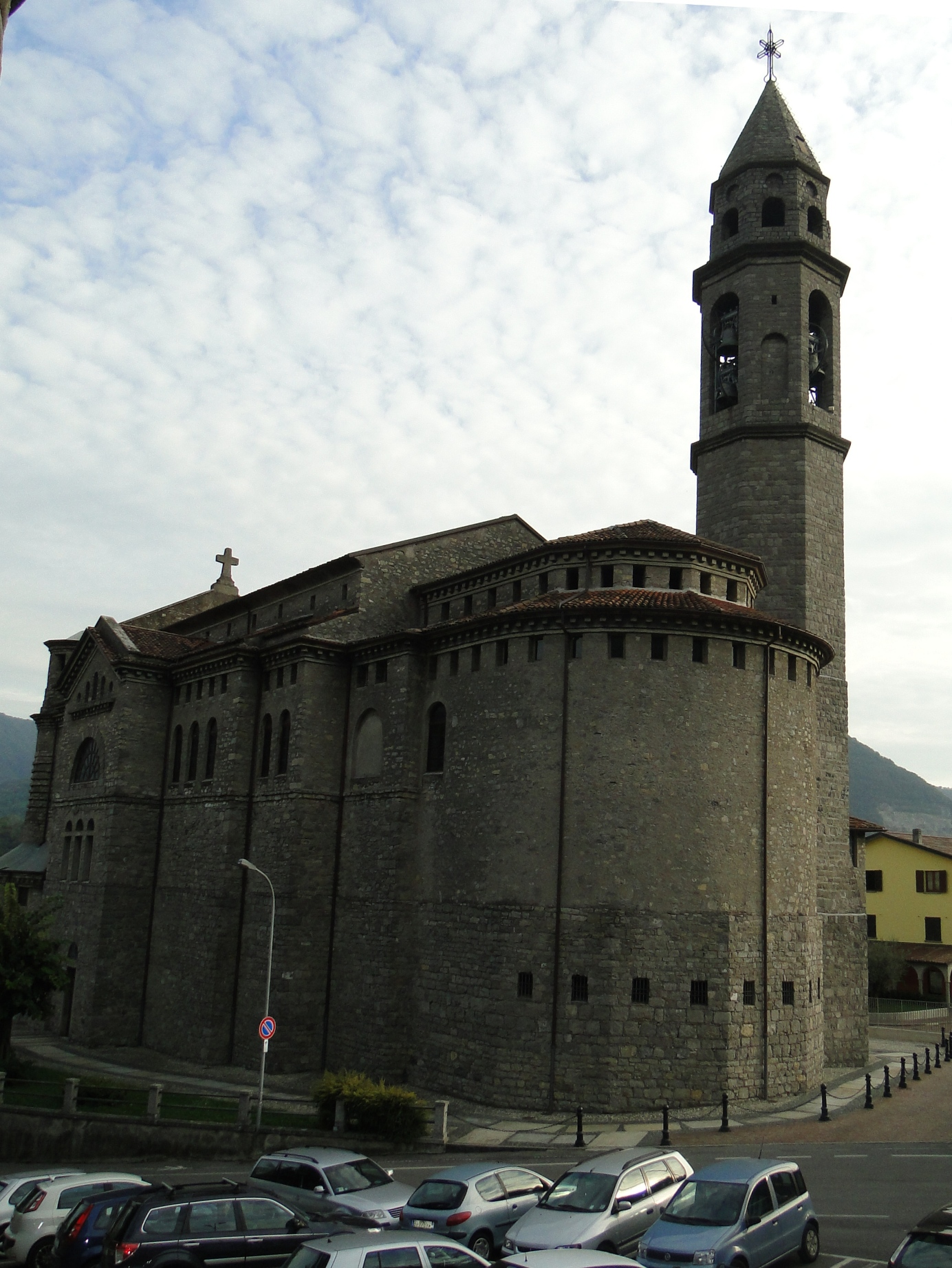 Comenduno, fraz. di Albino (BG), chiesa parrocchiale di Cristo Re